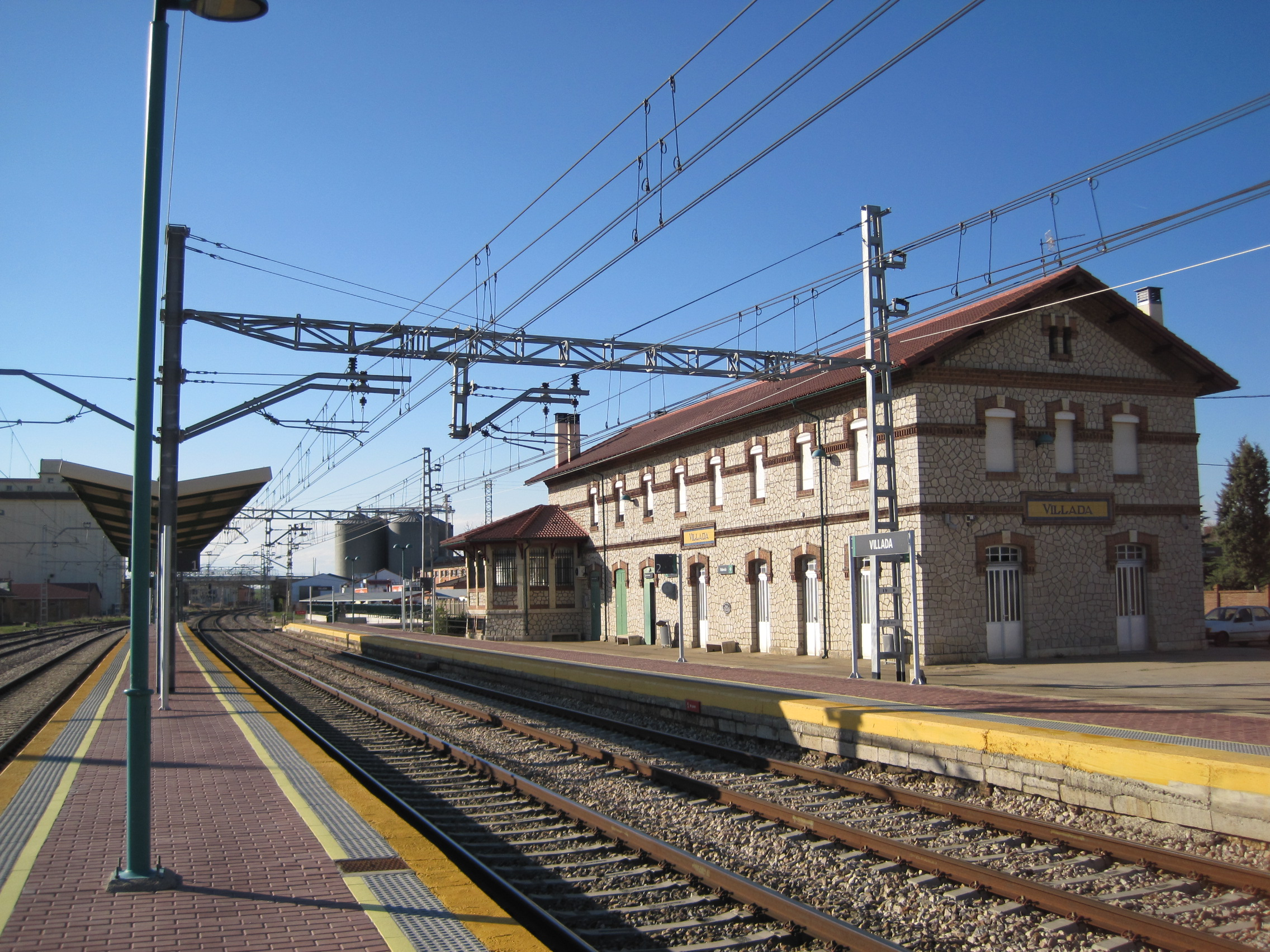 Vista exterior de la estación de Villada (Palencia, España).